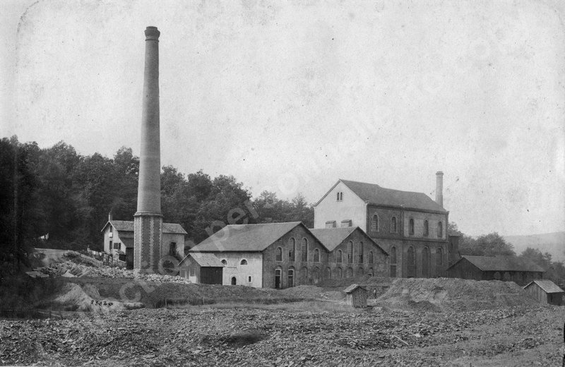 Le puits du Magny en cours d'aménagement. Le chevalement en bois du puits d'aérage ainsi que sa cheminé sont visibles.